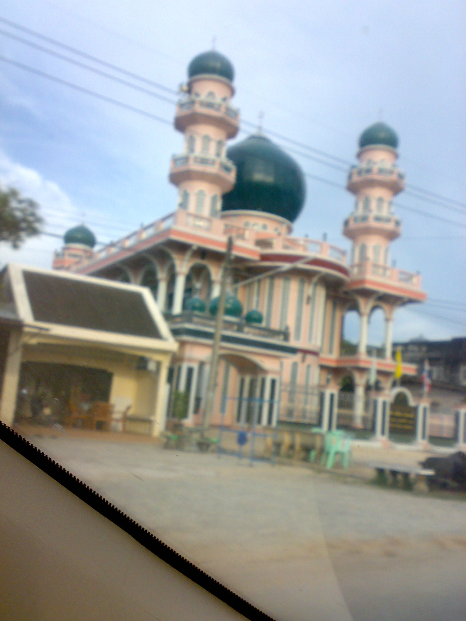 Bang Khli Mosque, moske, Phang Nga, Thailand